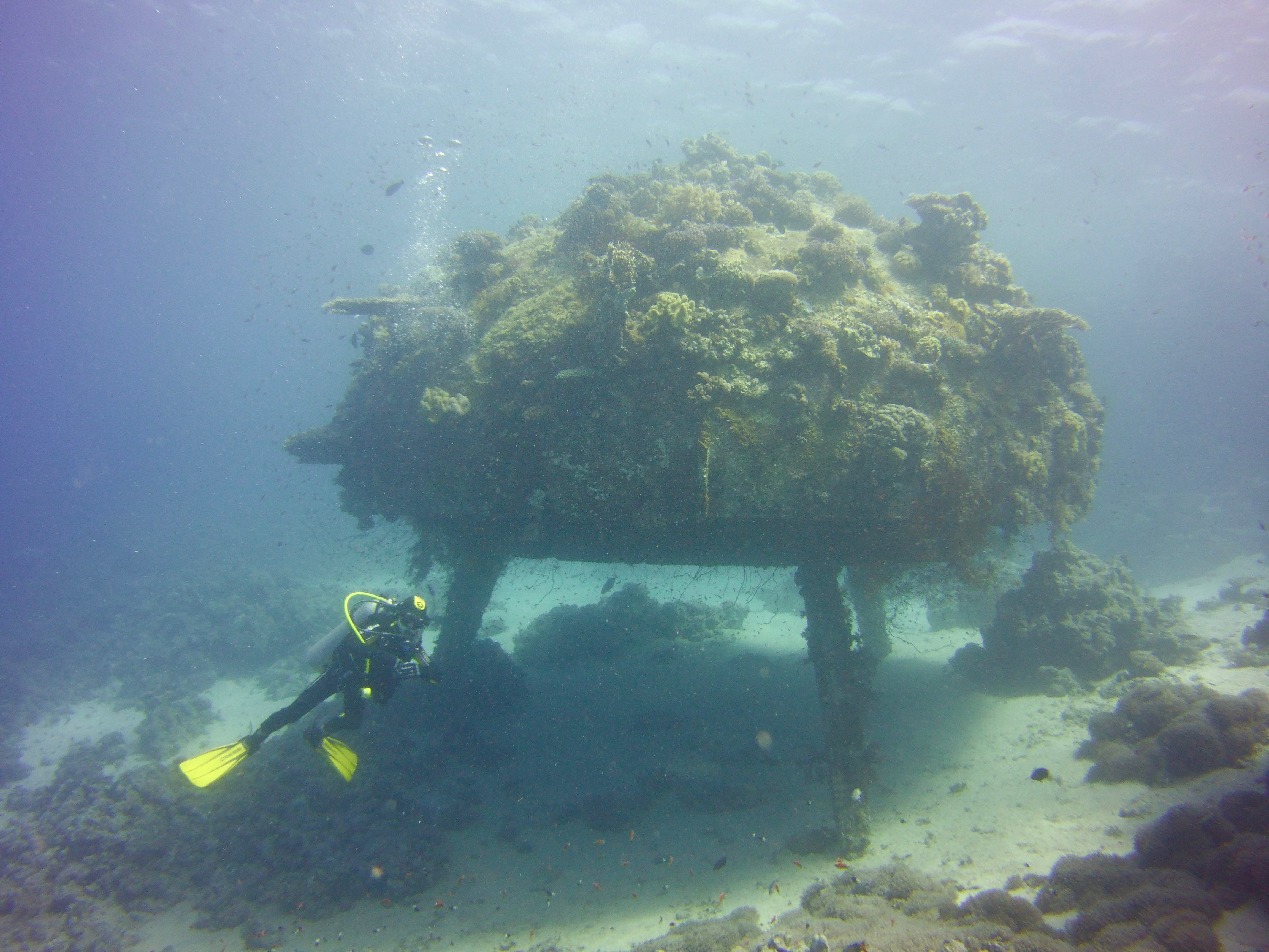 Precontinent II - Tauchsafari Sudan mit UMEX Tauchsport 2017